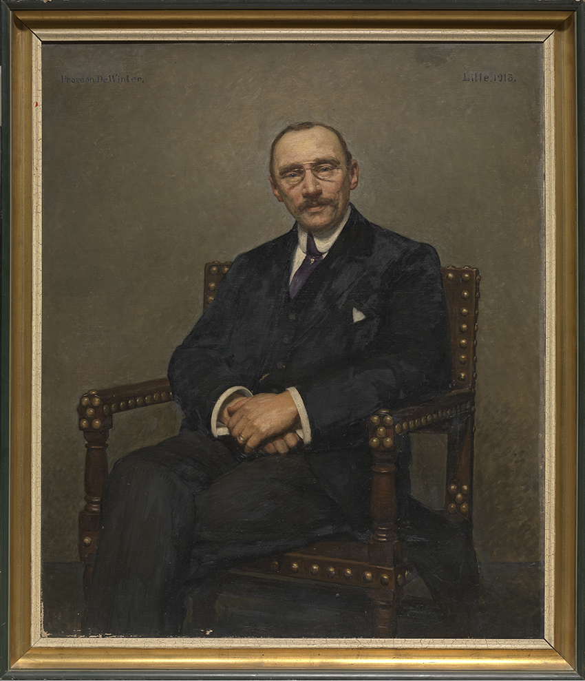 Portret van Ernest Gérard (Pharaon De Winter, 1913); collection: Musea Brugge - Groeningemuseum